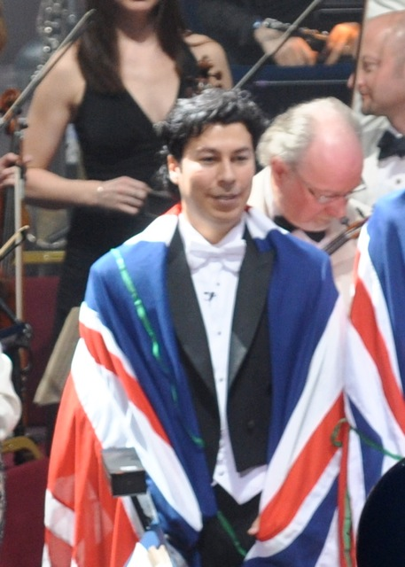 Jesús León at Royal Albert Hall, March 23, 2009